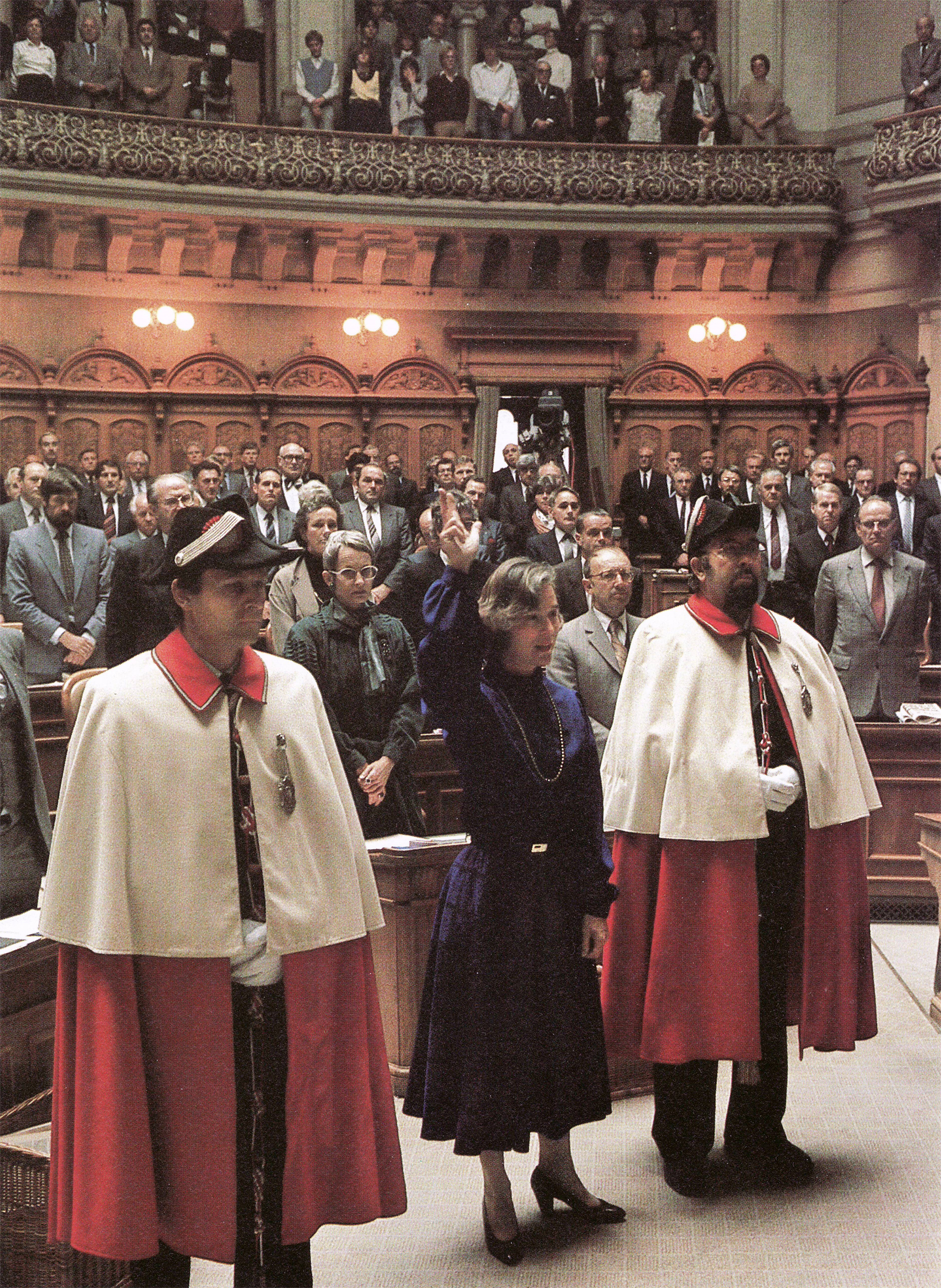 Die Bundesversammlung wählte Elisabeth Kopp am 2. Oktober 1984 in den Bundesrat